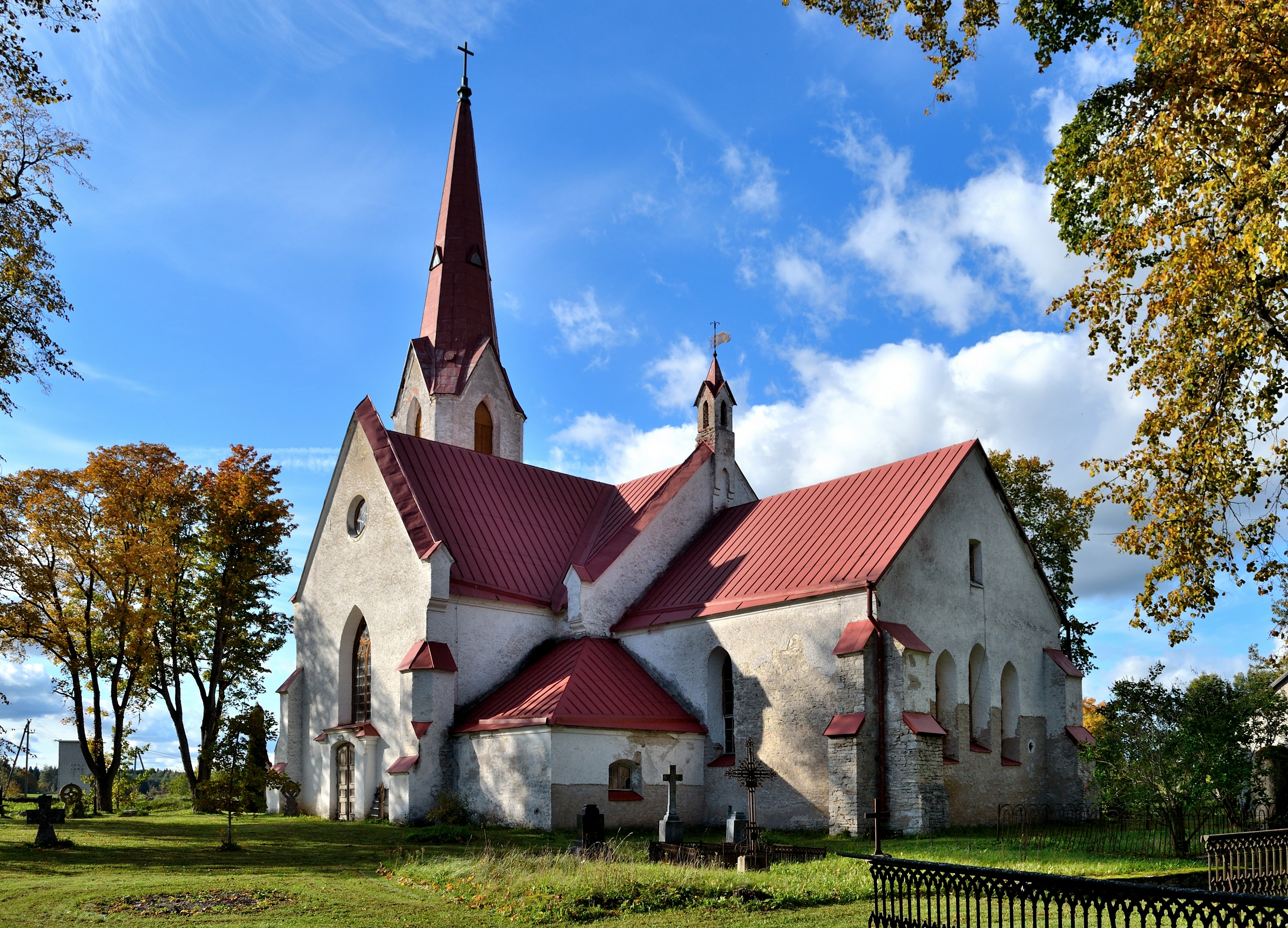 Juuru kirik